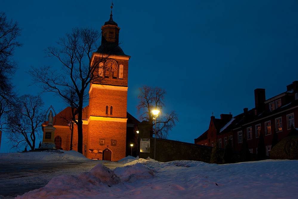 Węgorzewo, ul. Zamkowa 16 - dawny kościół ewangelicki, obecnie rzymskokatolicki parafialny p.w. świętych Piotra i Pawła, 1605-1611